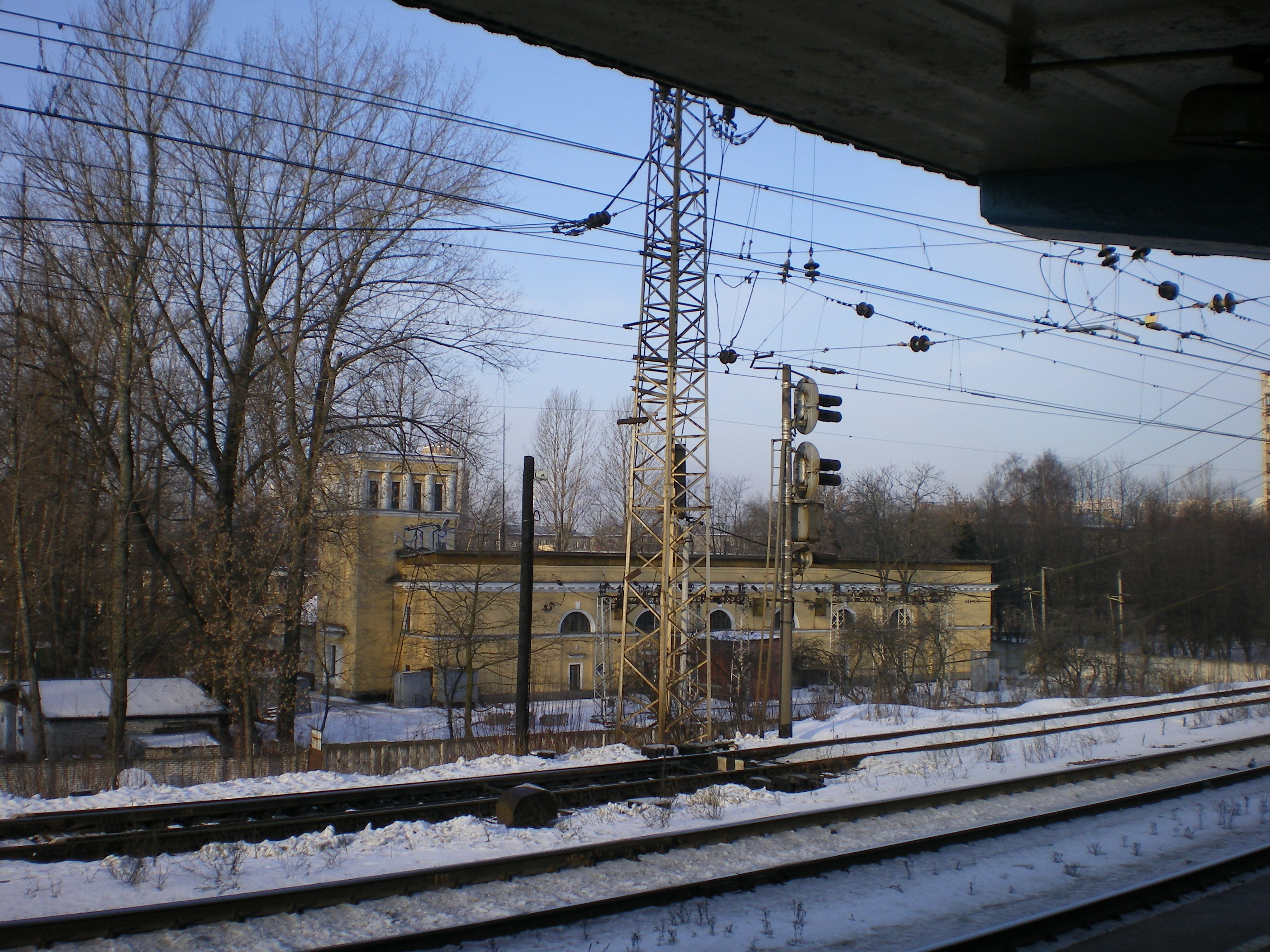 Ланская электроподстанция